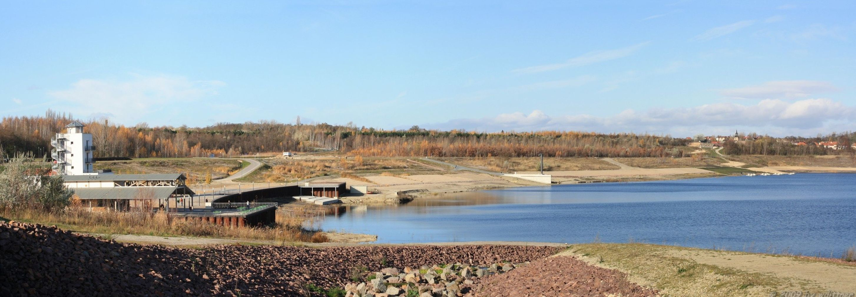 Blick zum Hafen